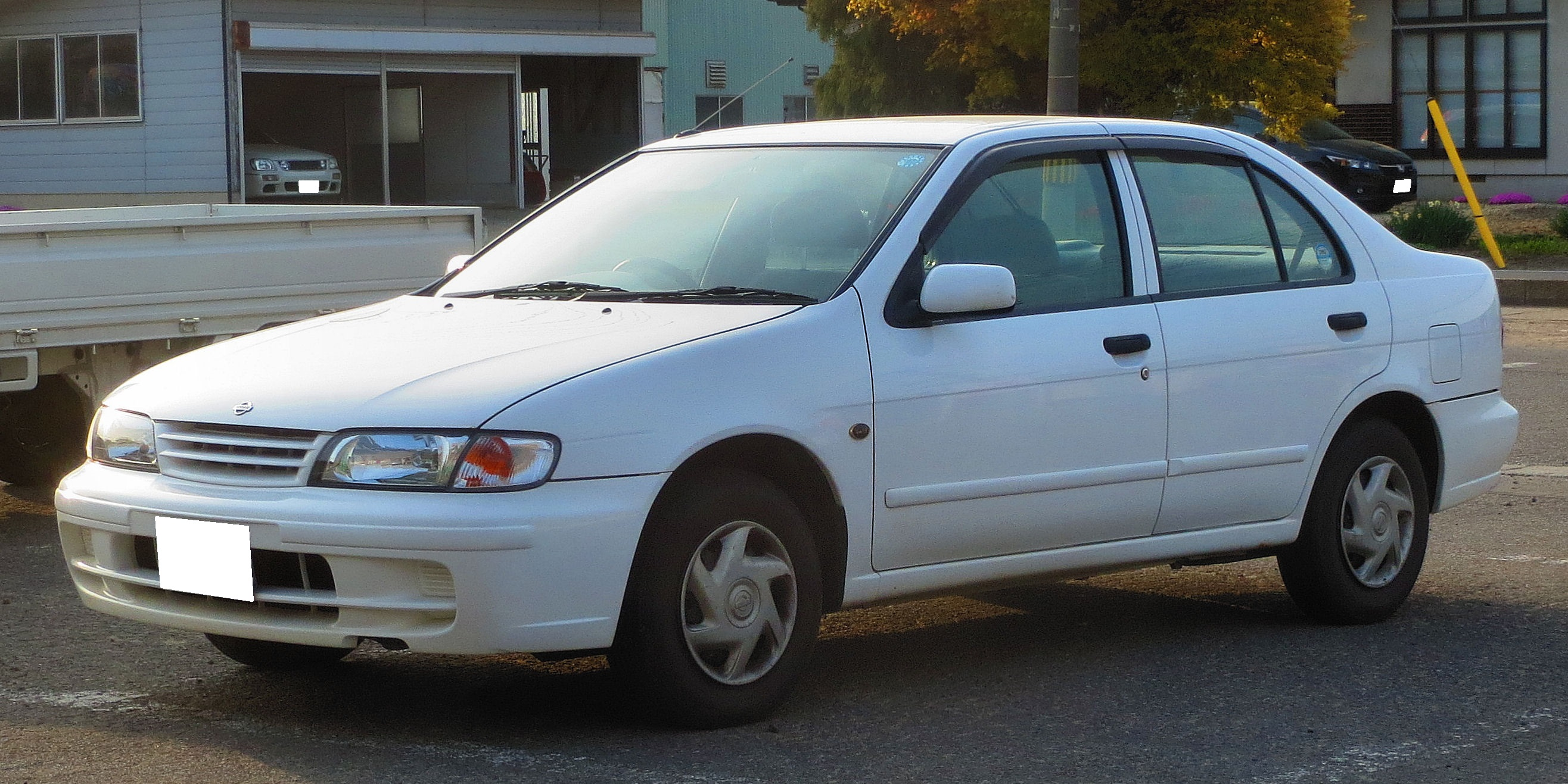 日産 N15型 パルサー CJ-Ⅰリミテッド